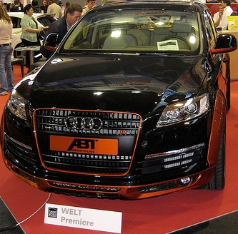 Abt Q7 on Tuningworld in Friedrichshafen (Germany)